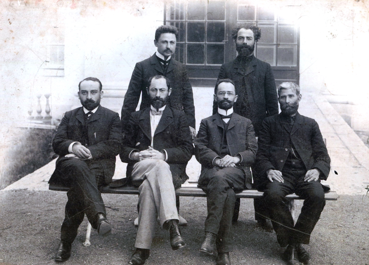 საქართველოს დამფუძნებელი კრების წევრები მეორე სათათბიროს პერიოდში, 1906 წ. სხედან მარცხნიდან მარჯვნივ: იოსებ ბარათაშვილი, ნოე ჟორდანია, მ.ს. ჯაფარიძე, ისიდორე რამიშვილი (Isidore Ramishvili); დგანან მარცხნიდან მარჯვნივ: ივანე გომართელი (Ivane Gomarteli), წერეთელი. გადაღების ადგილი და თარიღი უცნობია.